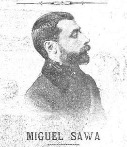 Retrato de Miguel Sawa.